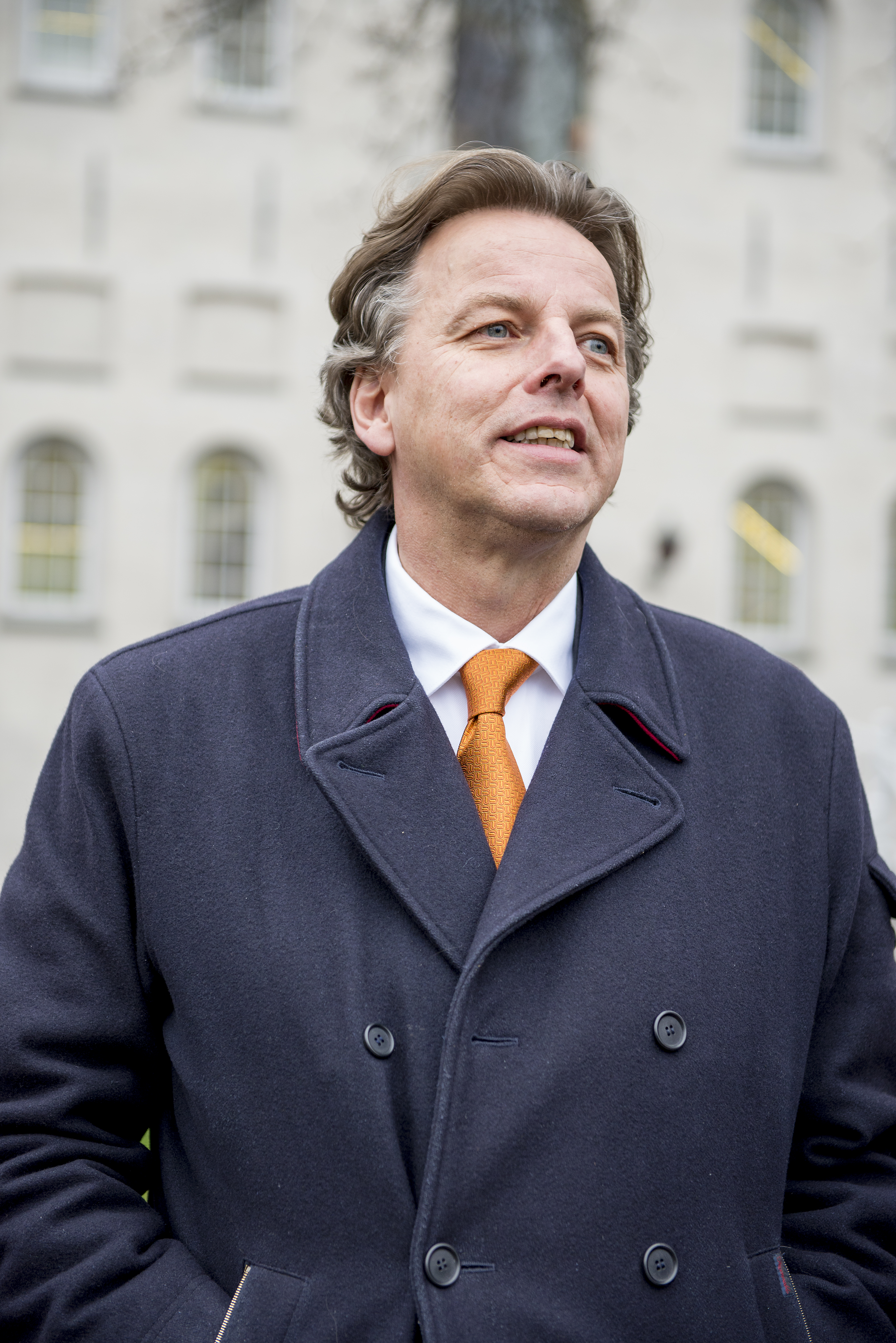 160104 werkbezoek Koenders Amsterdam EU Voorzitterschap 2784